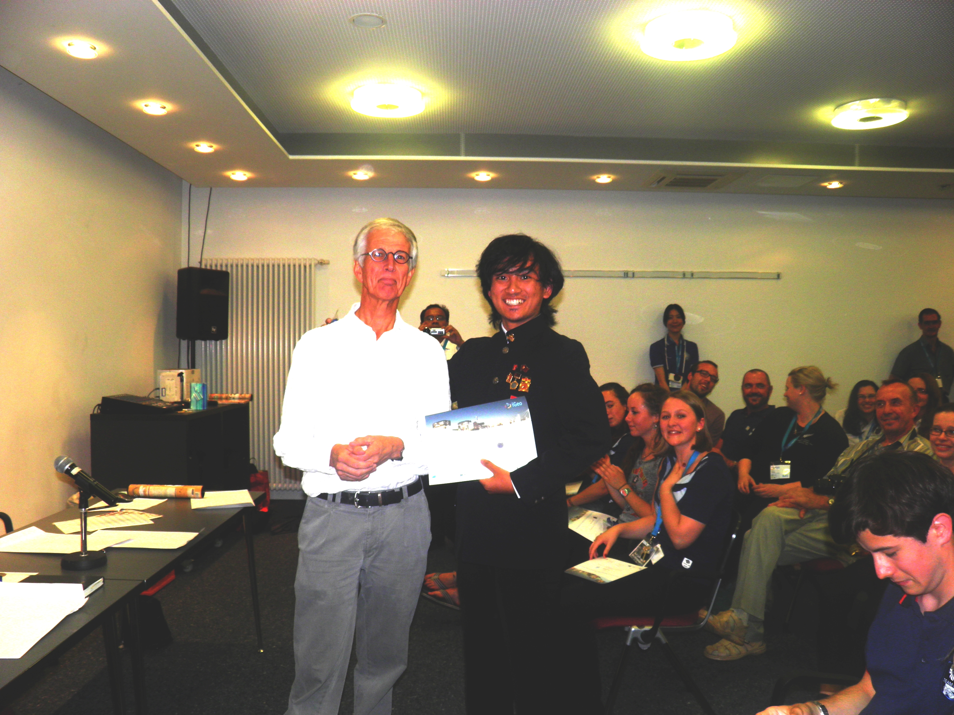 Bintang Rahmat Wananda menerima medali perak dalam ajang IGEO 2012.